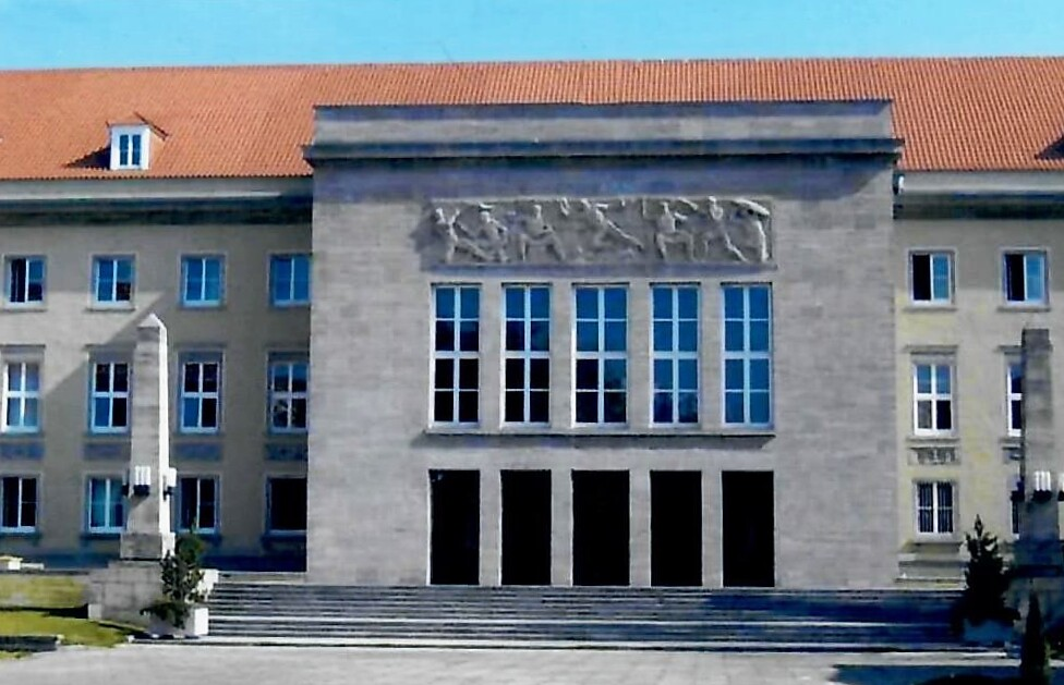 Hauptportal Block A, ehemalige Militärakademie "Friedrich Engels", Dresden-Strehlen, August-Bebel-Straße.